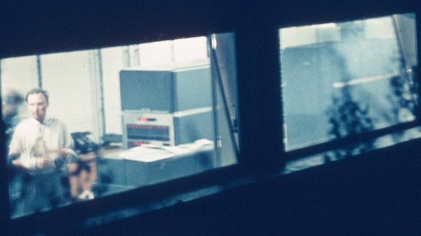 Rechenanlage IBM 650 an der TH Darmstadt, 1957 nachts mit Anwender Rolf Hagedorn (CERN), Lochkarteneinheit, Rechner und Stromversorgungseinheit.